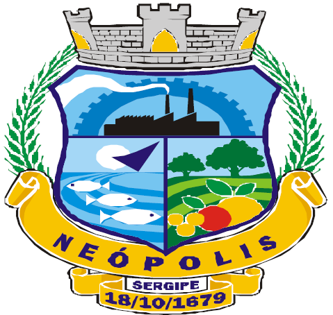 Brasão Municipal de Neópolis-SE